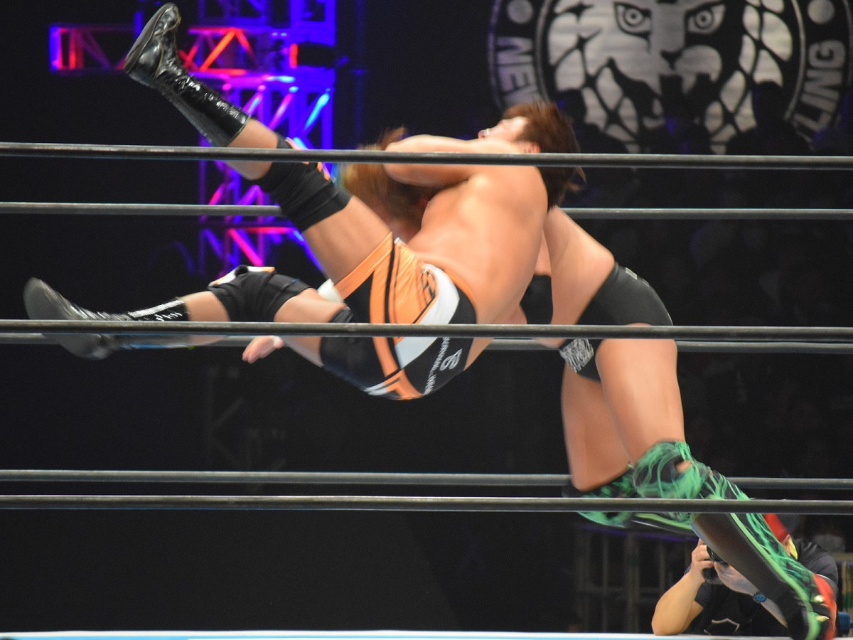 2017年2月11日 大阪府立体育会館 「THE NEW BEGINNING in OSAKA」 ヨシタツにコジコジカッターを放つ小島聡